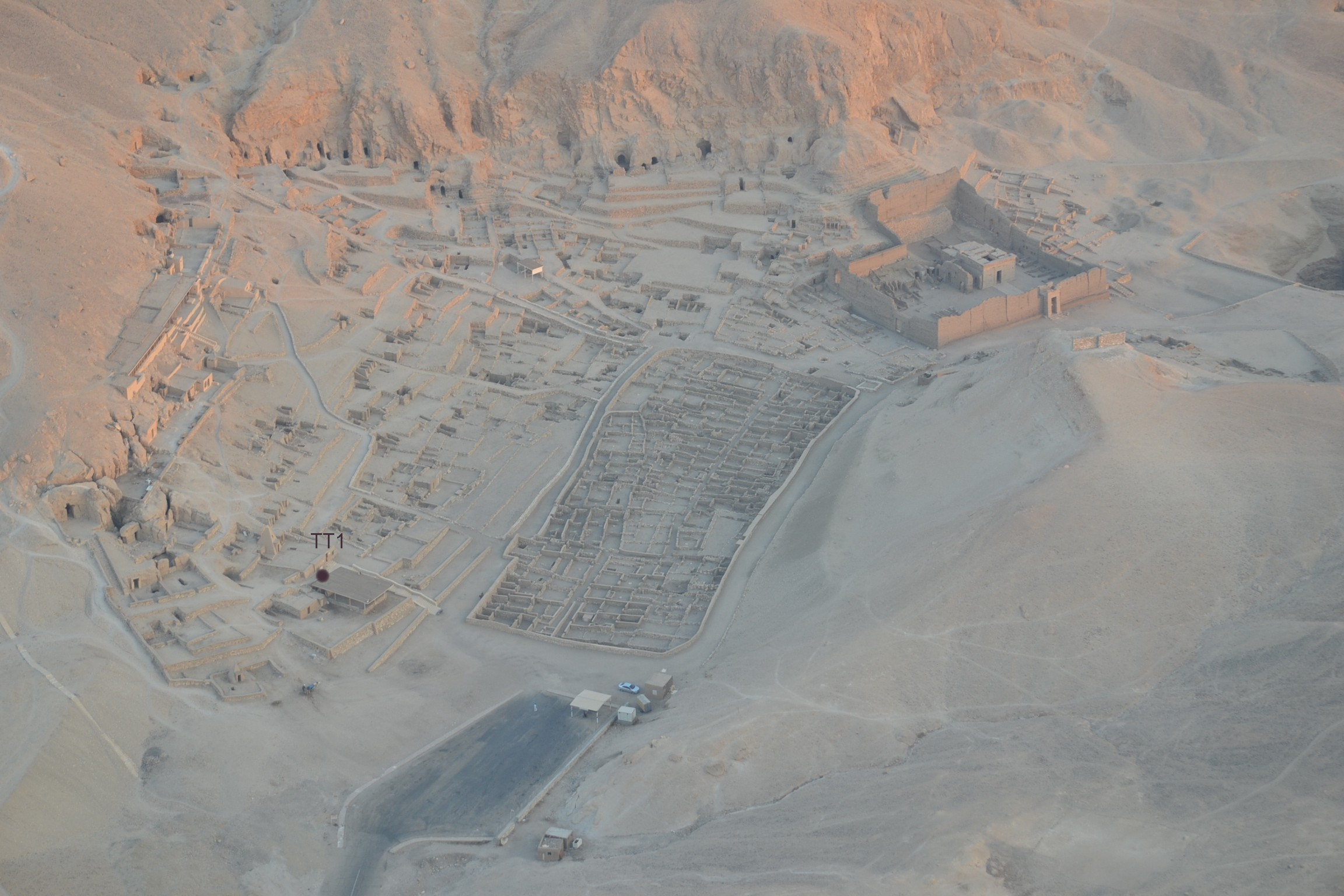 Szennedzsem sírja Derj-el-Medinében (Luxor, Egyiptom)